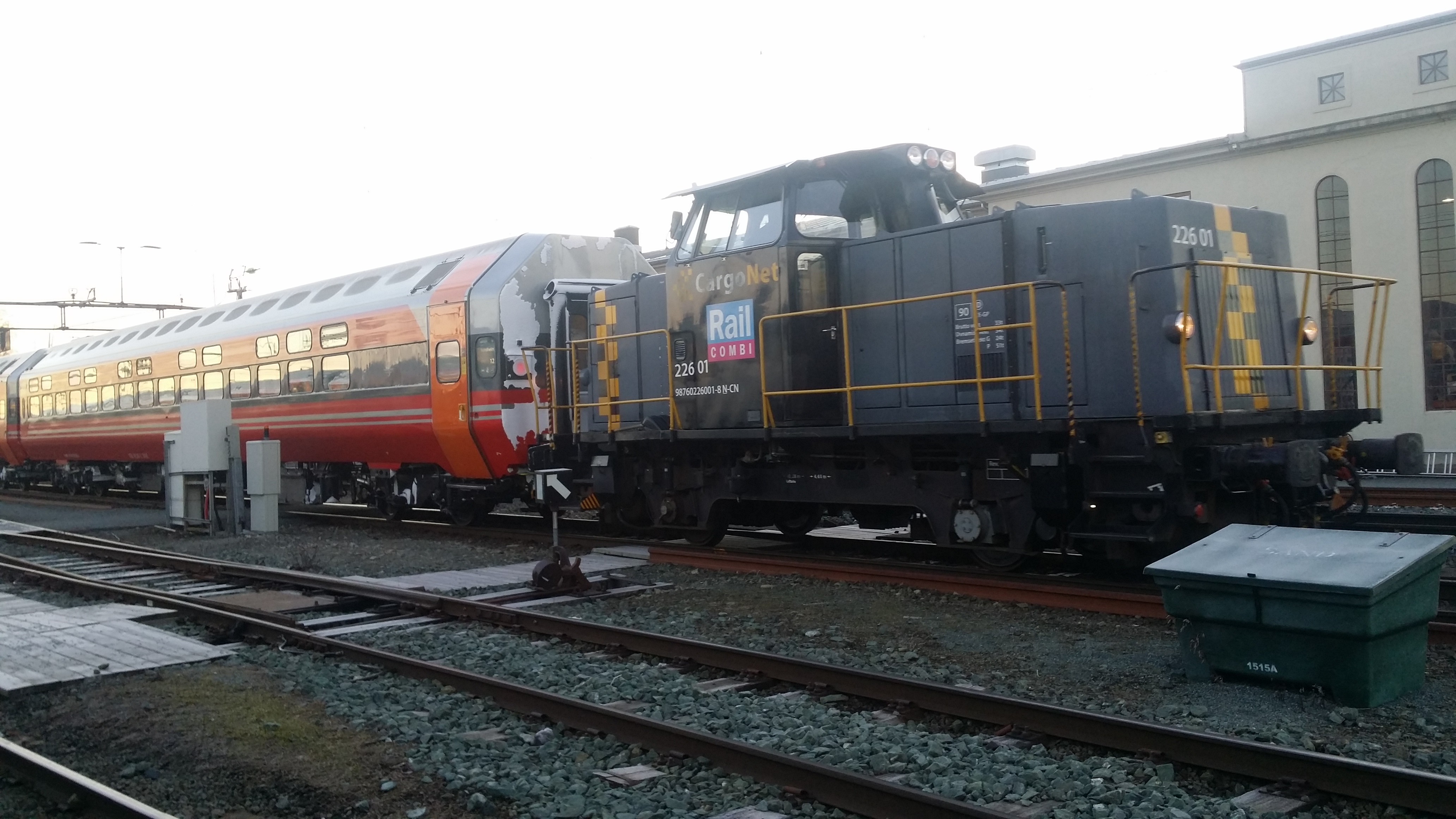 I bruk i skiftingen i Trondheim. Ommerket til Rail Combi.